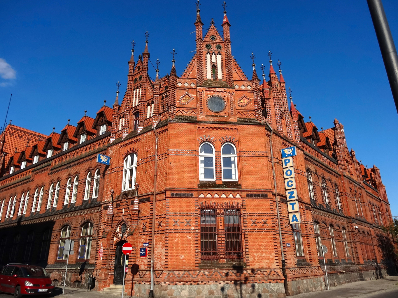 Budynek Poczty Głównej w Bydgoszczy przy ul. Jagiellońskiej (zbud. 1883 skrzydło płd, 1899 skrzydło płn)